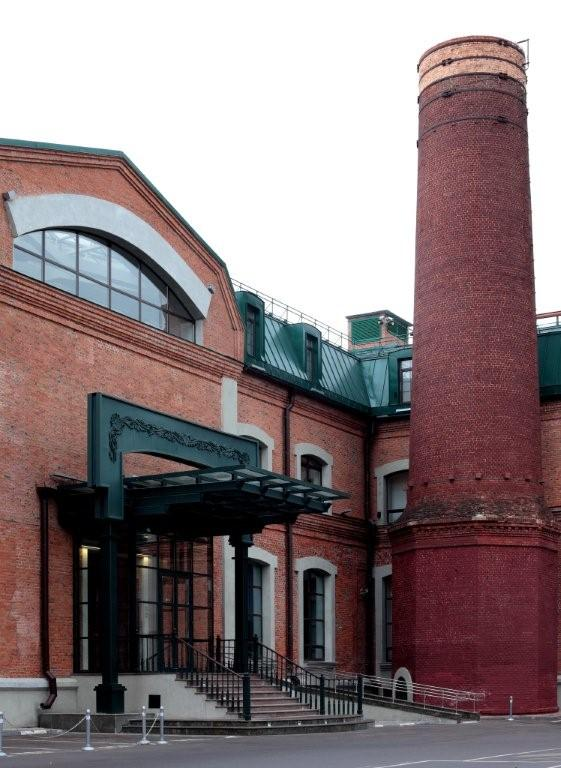 Институт русского реалистического искусства (ИРРИ)/ The Institute of Russian Realist Art (IRRA)